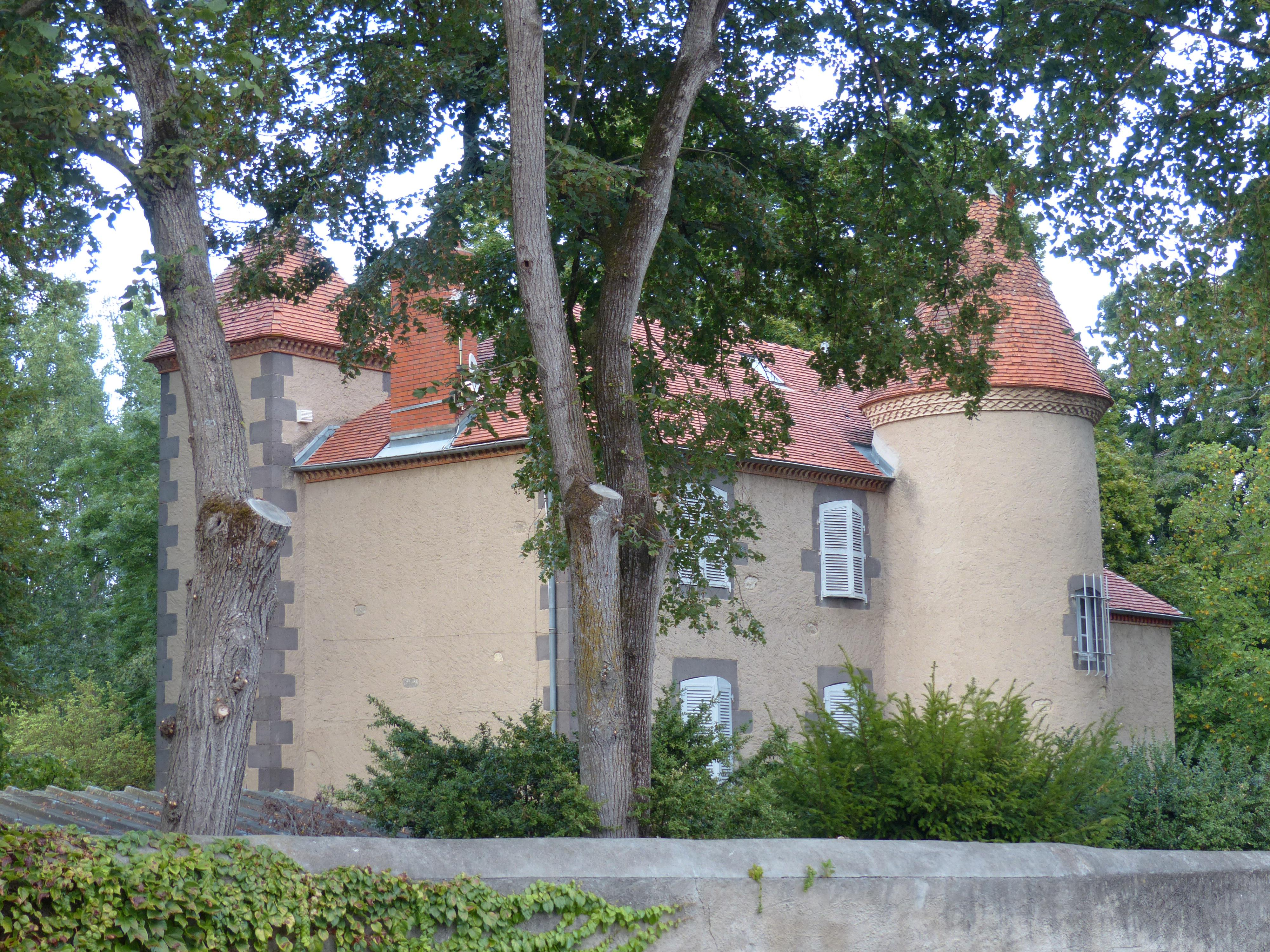 Varennes-sur-Morge (Puy-de-Dôme). Château de Bénistant ou de la Roche.